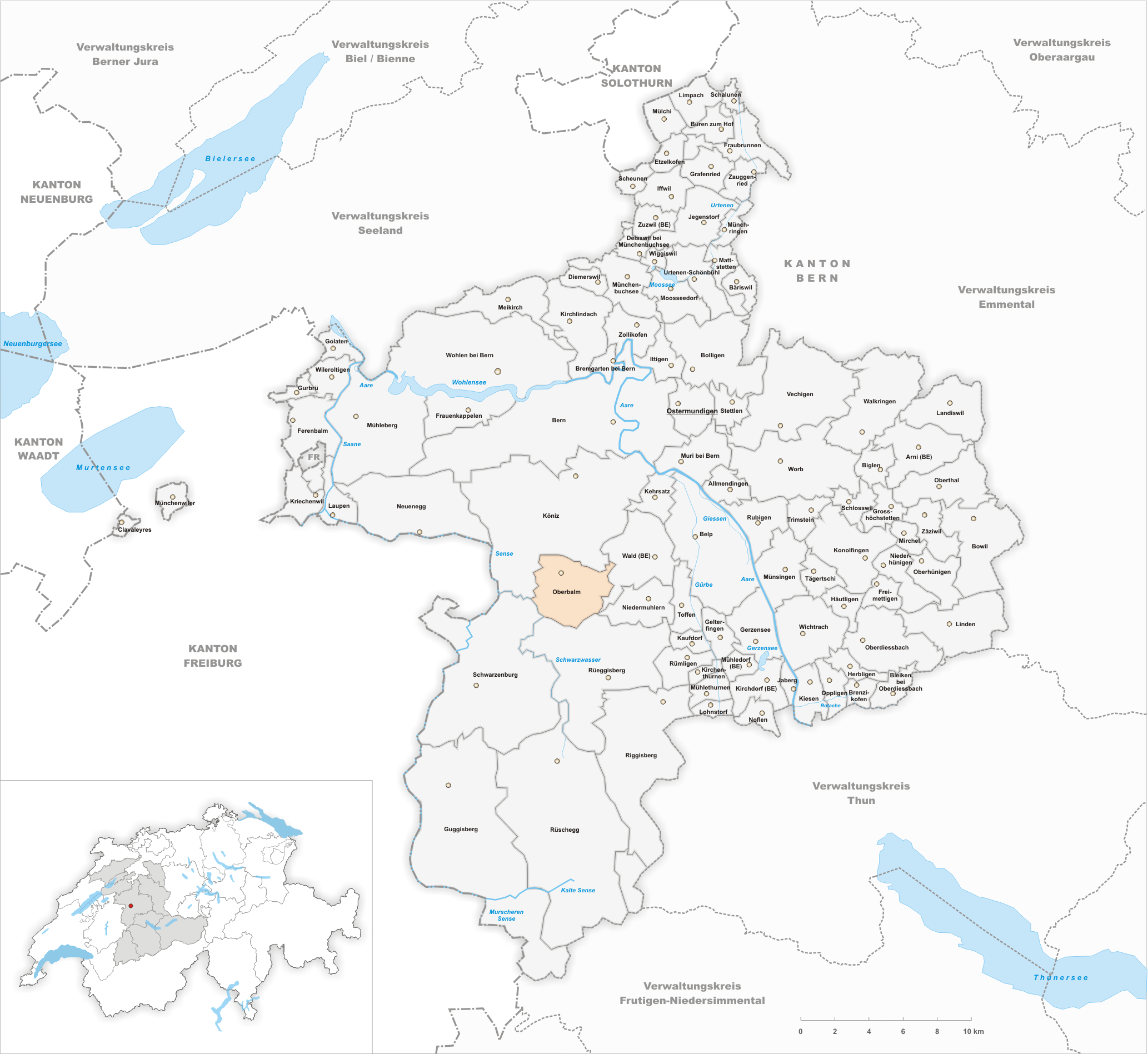 Municipality Oberbalm